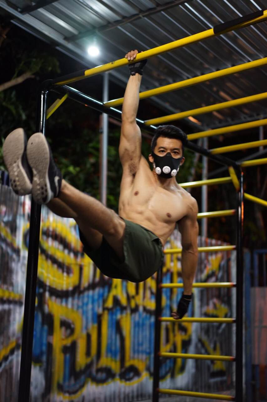 Gambar pelaku kalistenik, milik pribadi